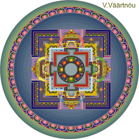 Guru Padmasambhava mandala alus.